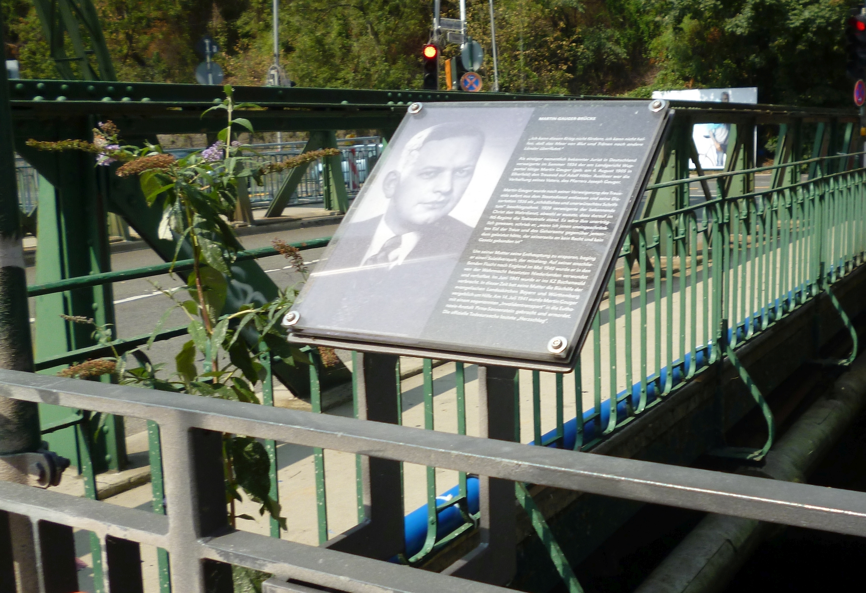 Im September 2017 angebrachte Gedenktafel für den Juristen und Pazifisten Martin Gauger unmittelbar neben der Schwebebahn-Haltestelle Landgericht an der Brücke über die Wupper in Wuppertal-Elberfeld. Gleichzeitig wurde die Brücke zur Gerichtsinsel nach ihm benannt.